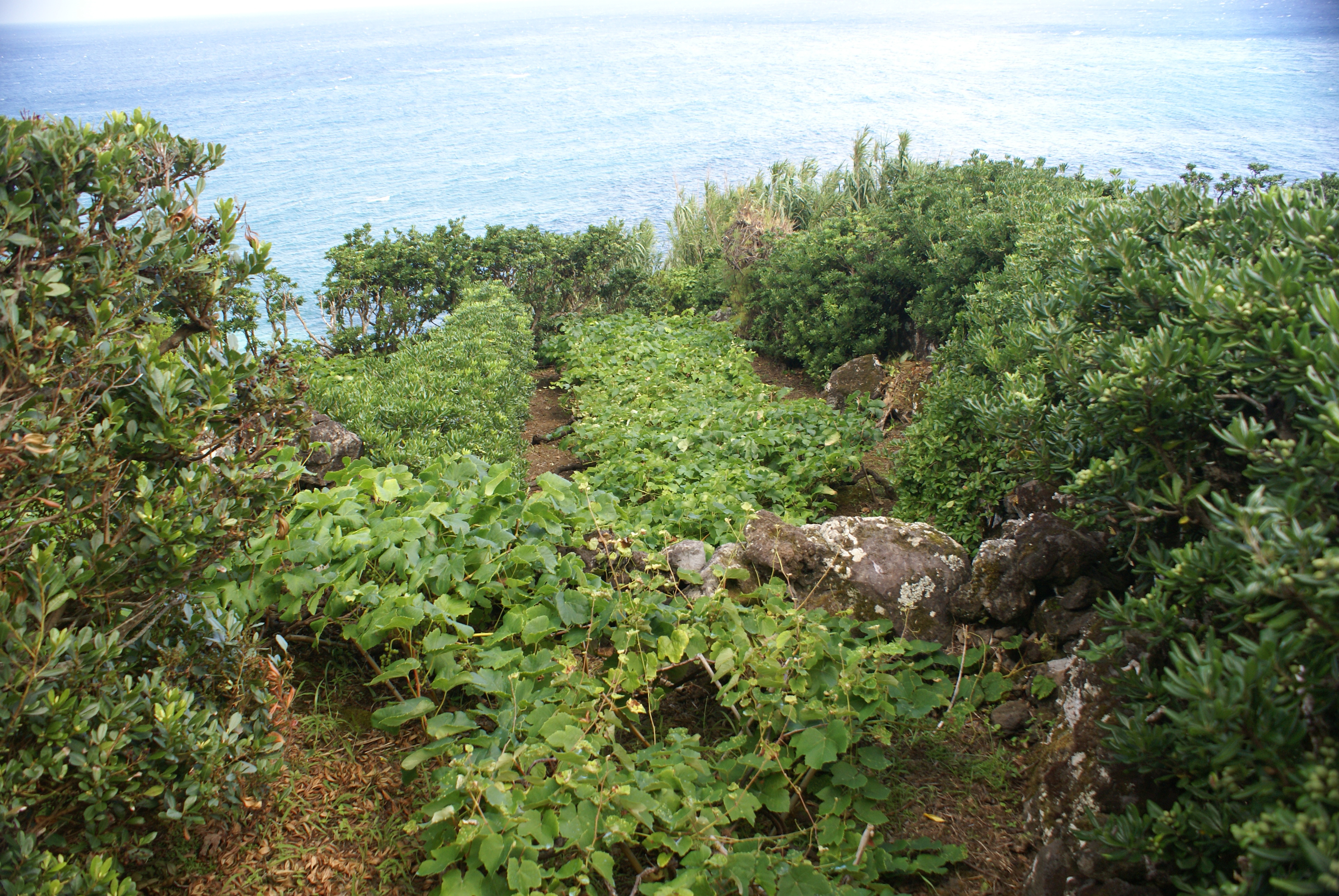 Terrenos de cultivo de vinhas pertencente a João dos Santos Bettencourt, Fajã do Meio, Velas, ilha de São Jorge